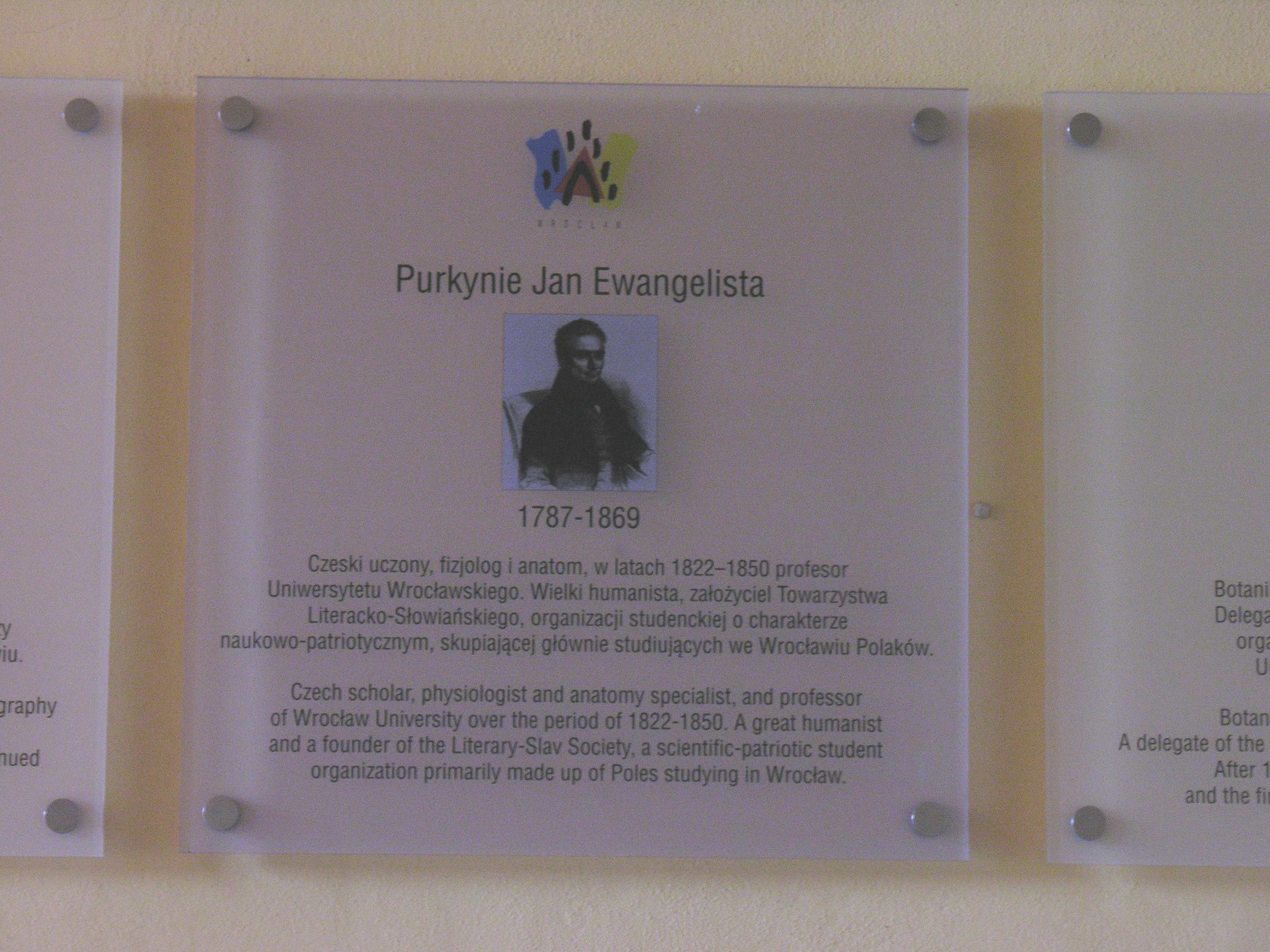 Tablica ku czci Jana Ewangelisty Purkyniego w przejściu pod głównym budynkiem Uniwersytetu Wrocławskiego